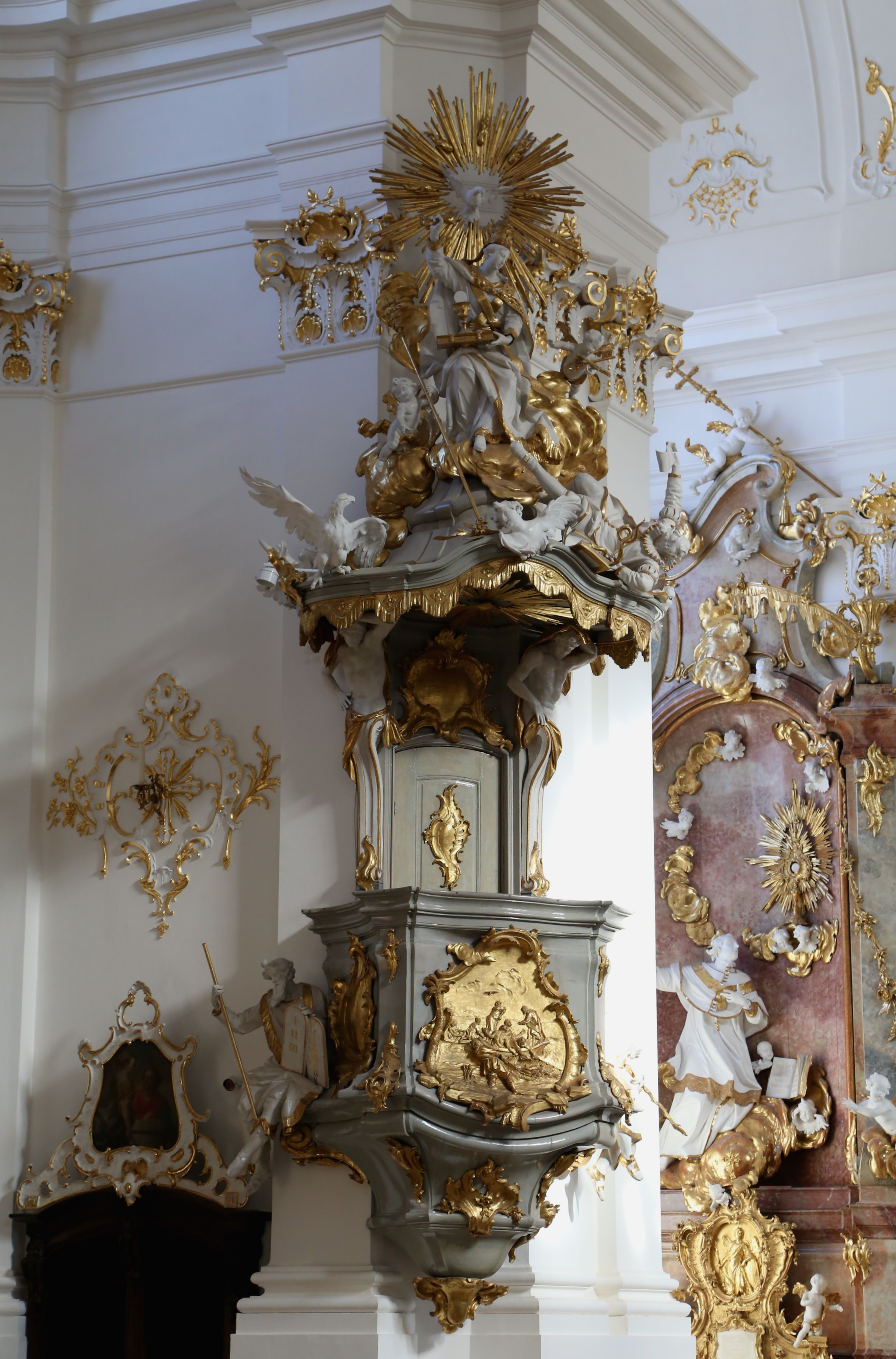 Kanzel, Klosterkirche St. Dionysius und Juliana, Kloster Schäftlarn